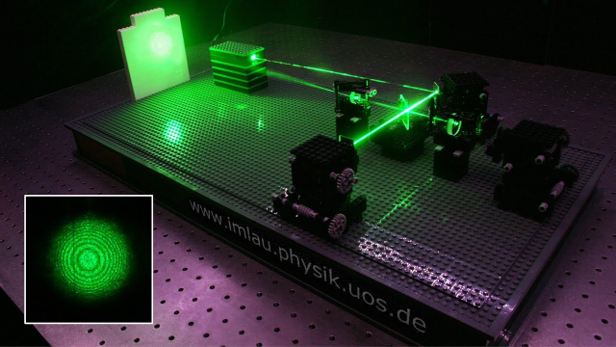 איור 1